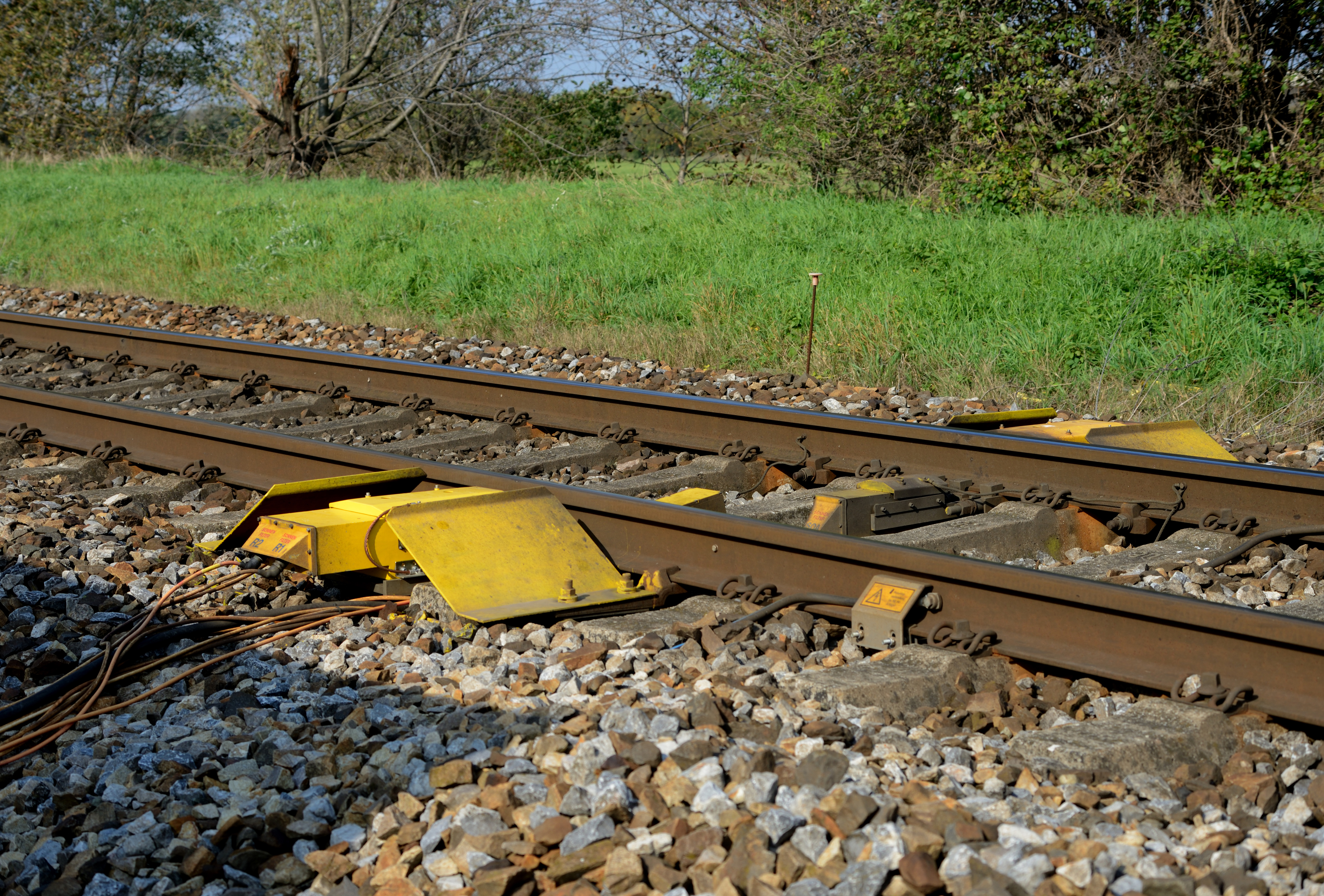 Heißläuferortungsanlage bei Km 7.050 der Marchegger Ostbahn